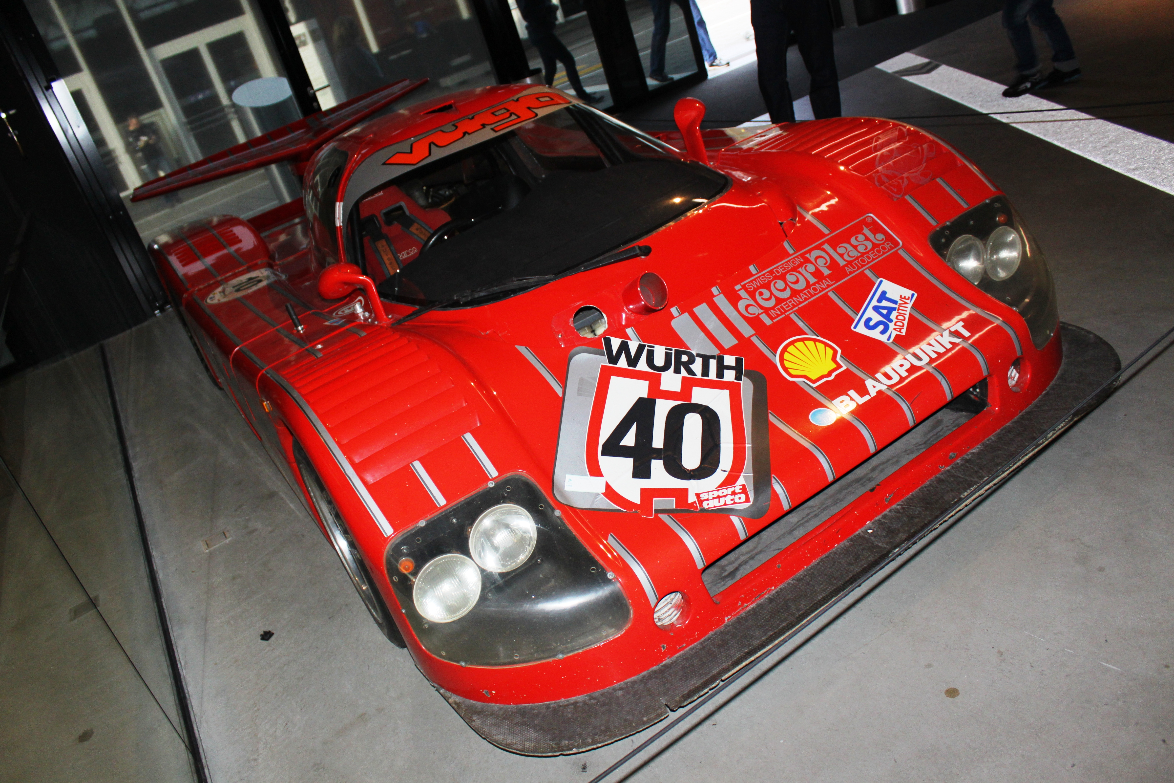 La Sauber Sehcar C6 d'Antoine Salamin au musée des transports de Lucerne, en 2013